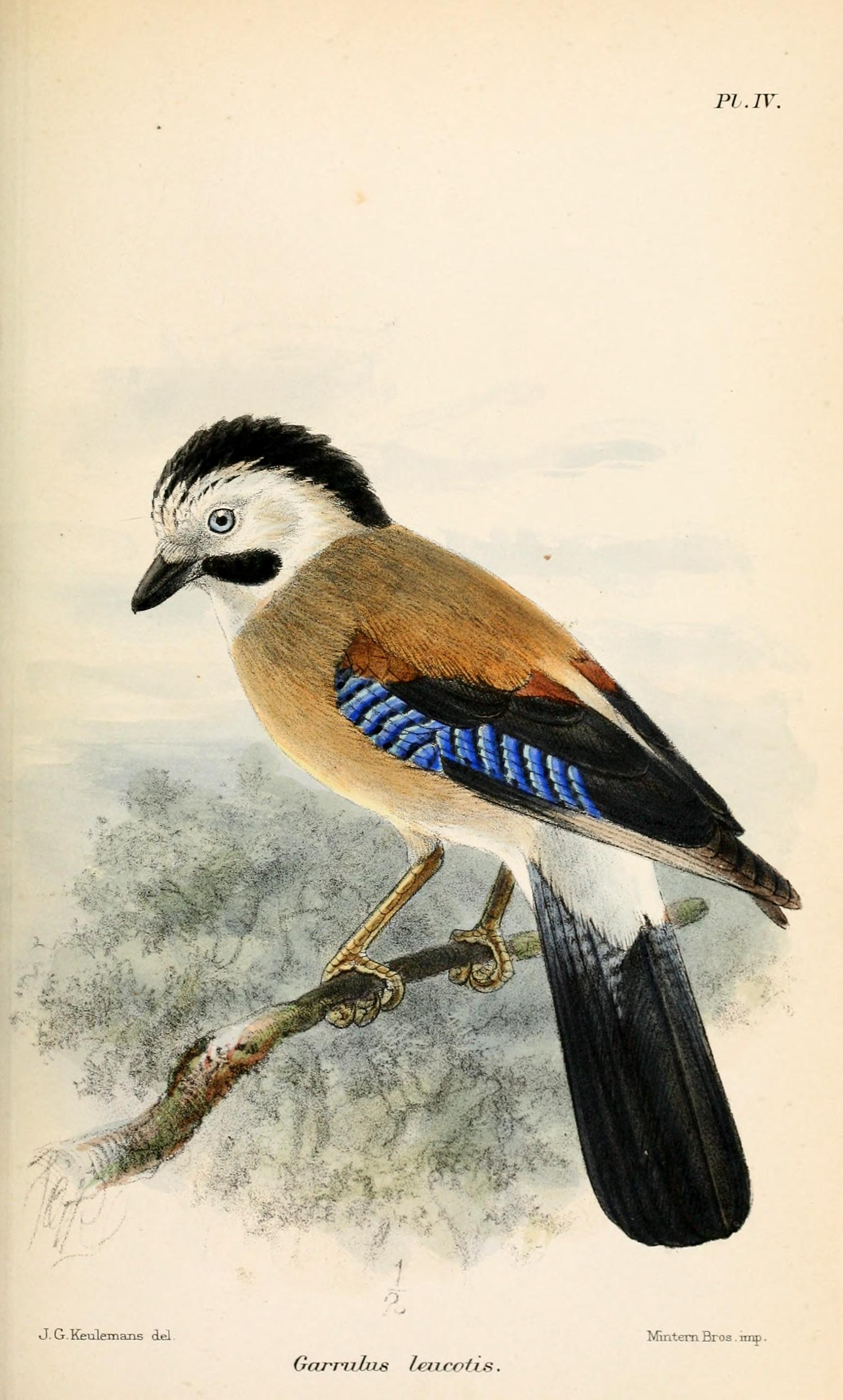 Garrulus leucotis = Garrulus glandarius leucotis group, Eurasian Jay ssp.